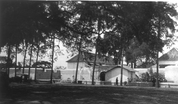 Foto. Benteng Engelenburg dengan rumah sakit lama di Klaten, Jawa Tengah